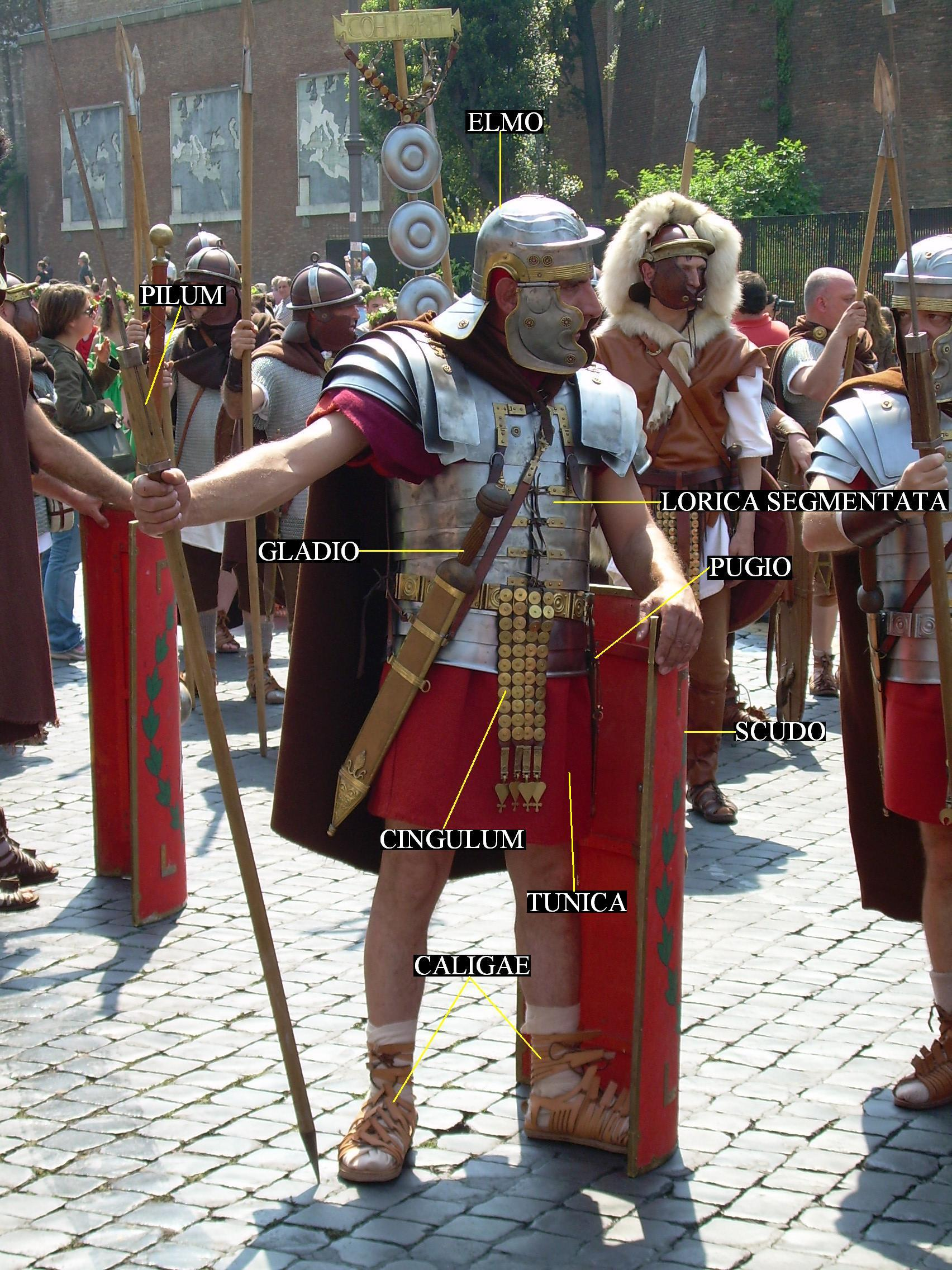 armi del legionario romano in eta' imperiale II Sec. D.C. Ricostruzione ad opera della LEGIO XXX ULPIA TRAIANA VICTRIX ONLUS